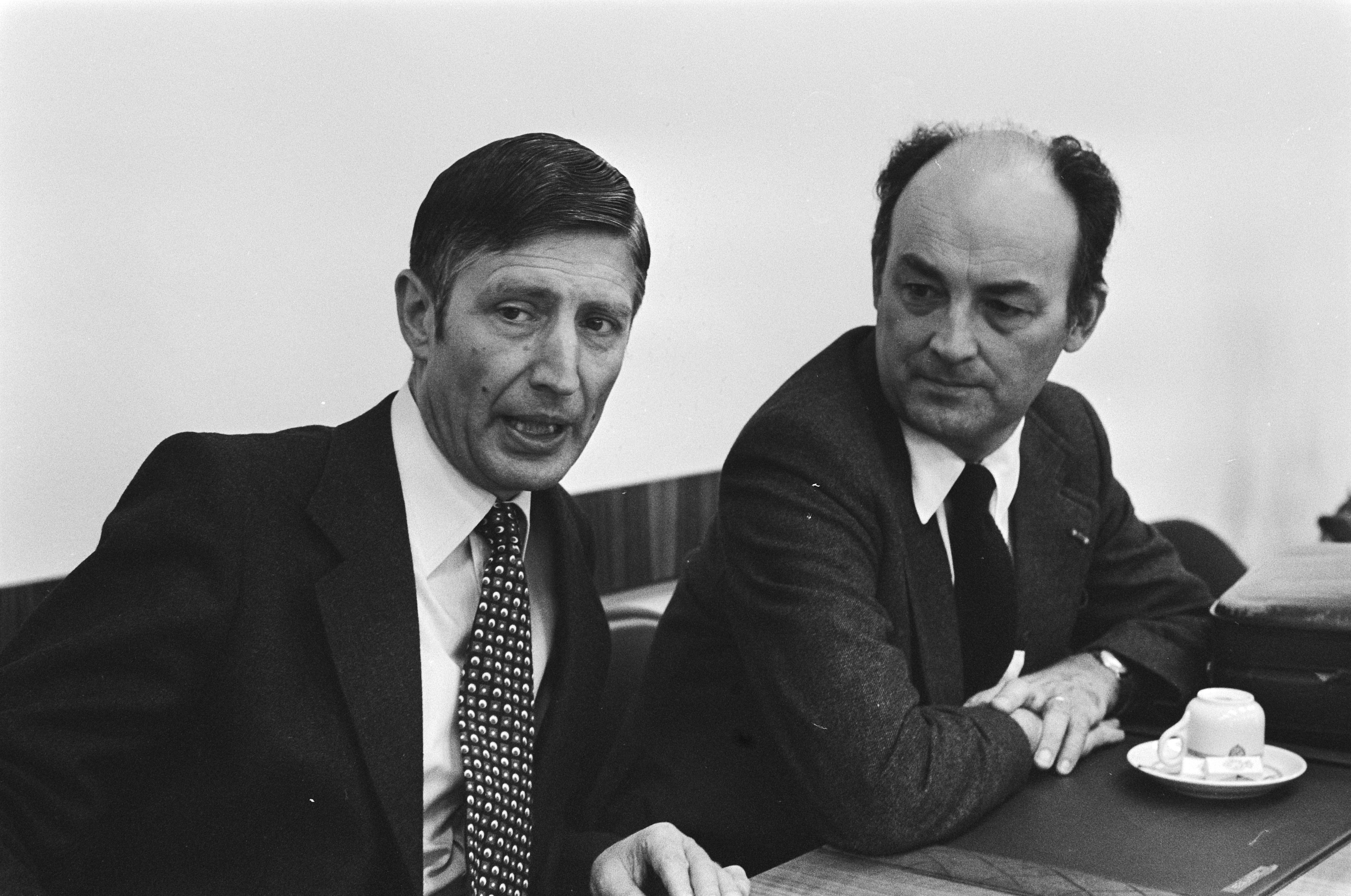 Collectie / Archief : Fotocollectie Anefo Reportage / Serie : [ onbekend ] Beschrijving : CDA-vergadering; Van Agt (l) met Aantjes Datum : 26 augustus 1977 Trefwoorden : politiek Fotograaf : Verhoeff, Bert / Anefo Auteursrechthebbende : Nationaal Archief Materiaalsoort : Negatief (zwart/wit) Nummer archiefinventaris : bekijk toegang 2.24.01.05 Bestanddeelnummer : 929-3224